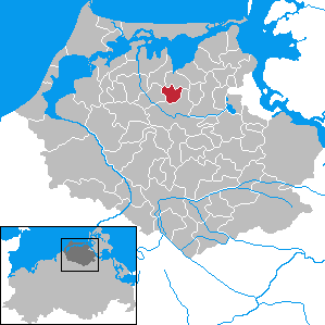 Karnin in Mecklenburg-Vorpommern - District Nordvorpommern